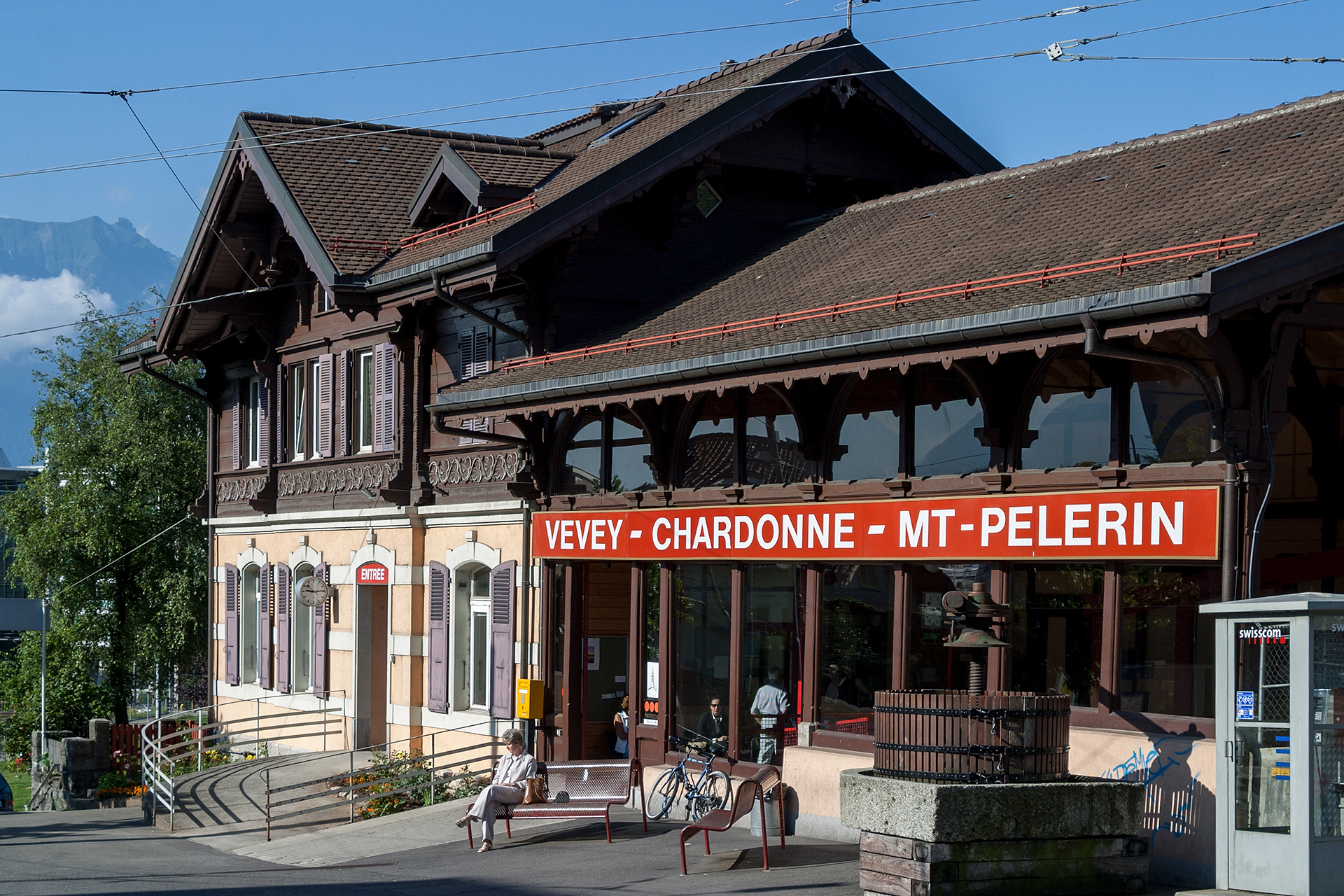 Talstation der Drahtseilbahn Vevey-Mont-Pèlerin in Vevey